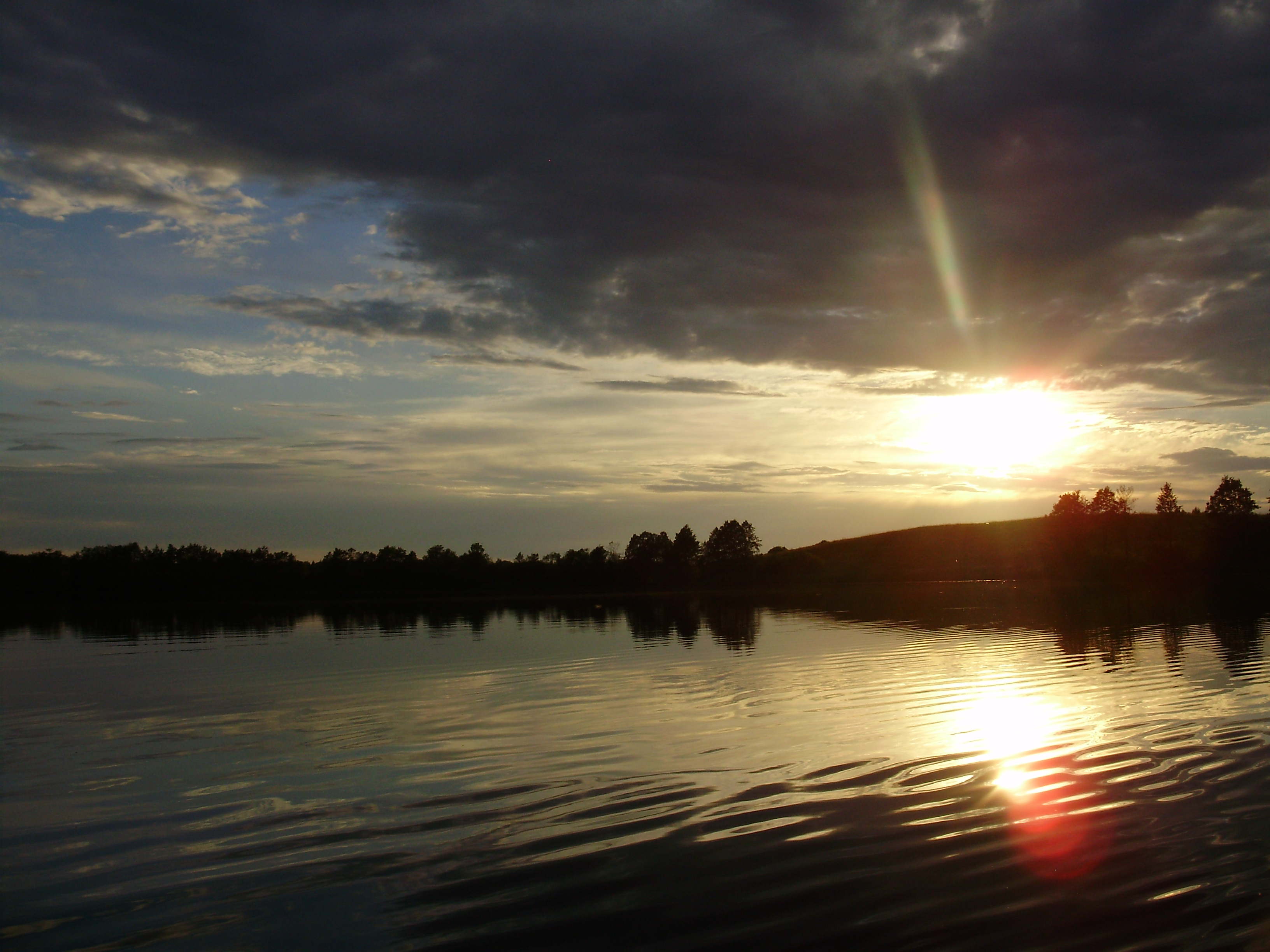 Рокотово